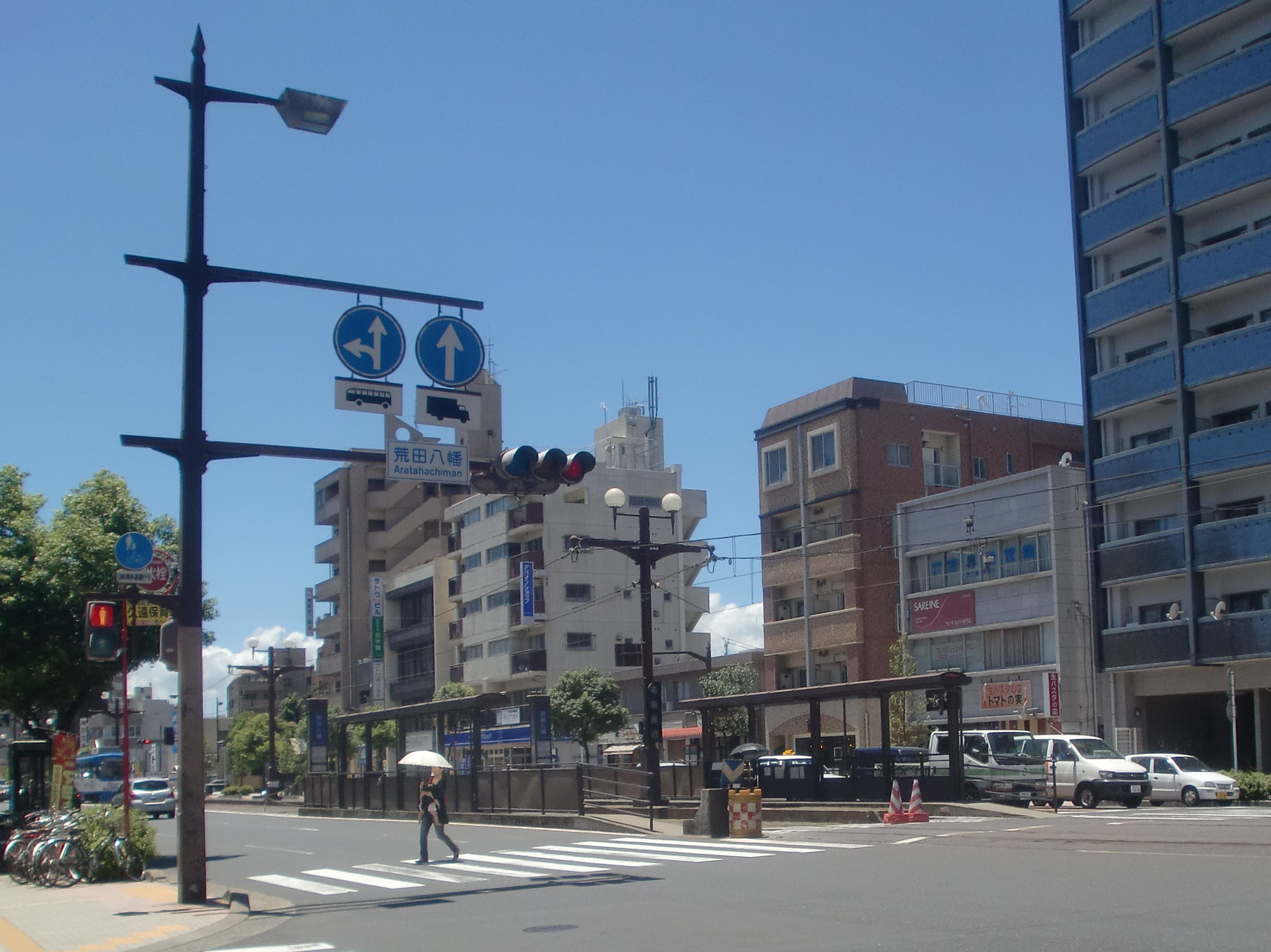 荒田八幡駅の外観。